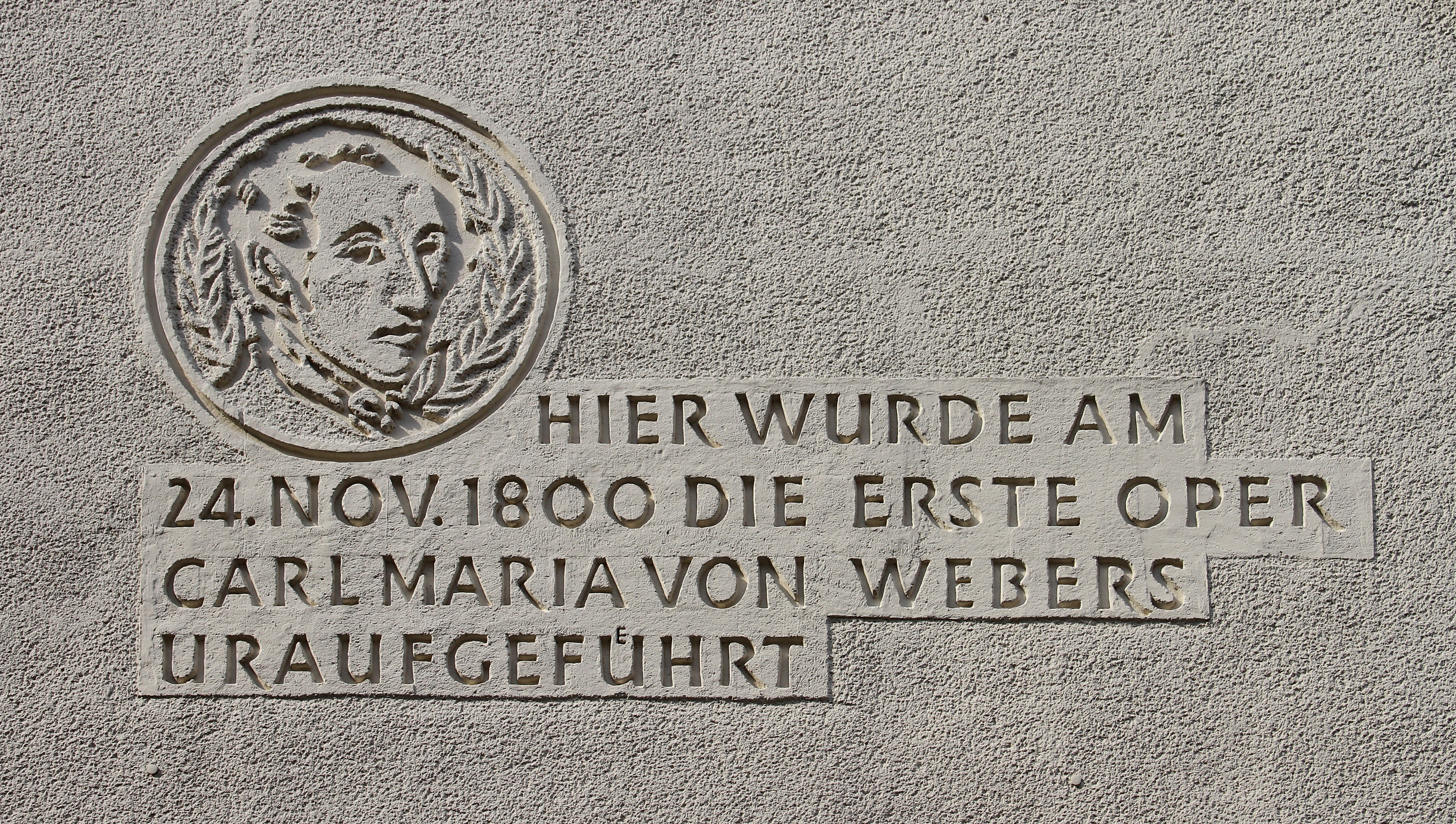 Kulturdenkmal in Freiberg; Denkmalsnummer und Adresse laut Dateiname. Erinnerung an die Uraufführung von Webers Das Waldmädchen am Freiberger Theater.